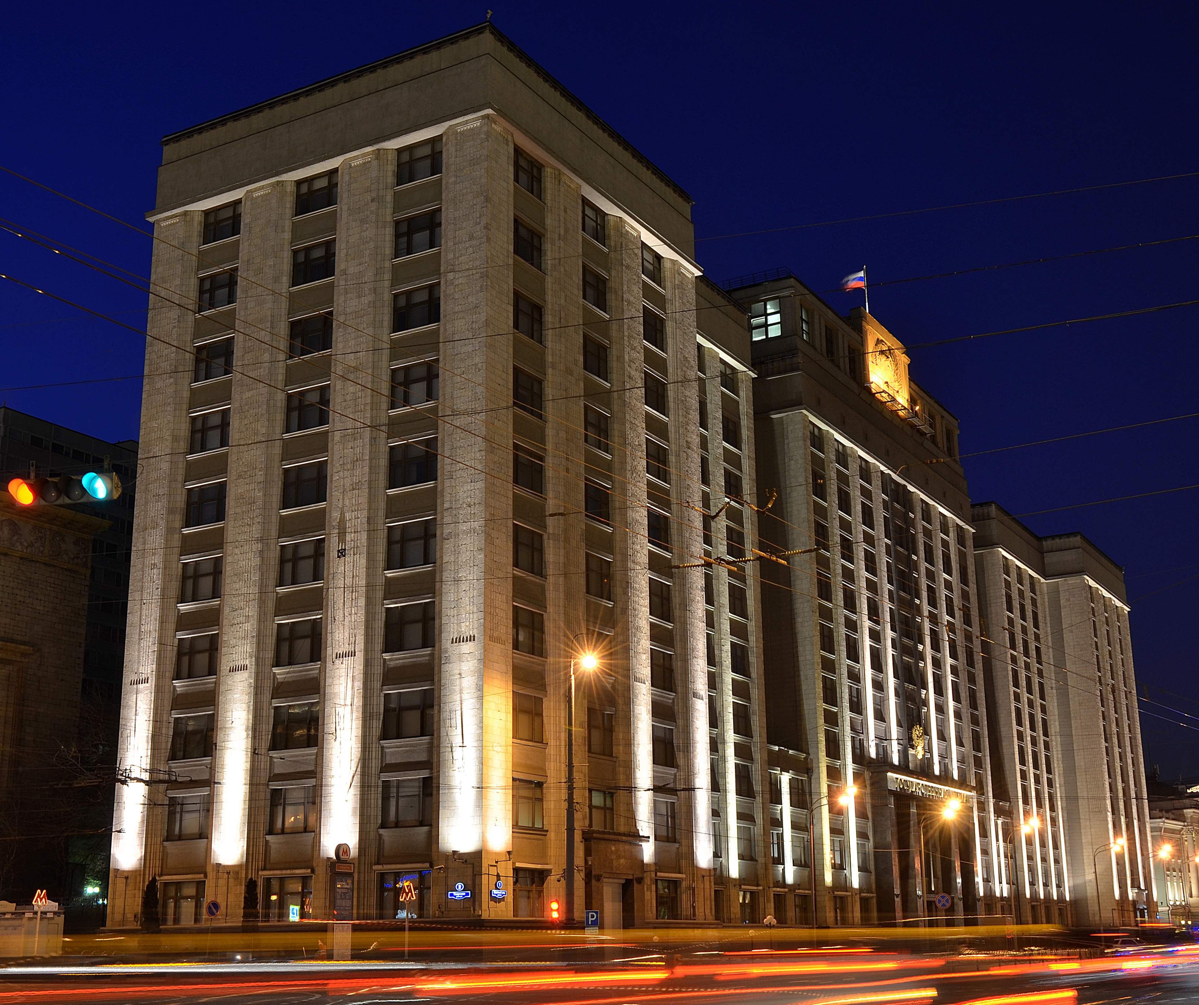 Можно увидеть здесь : You can see here